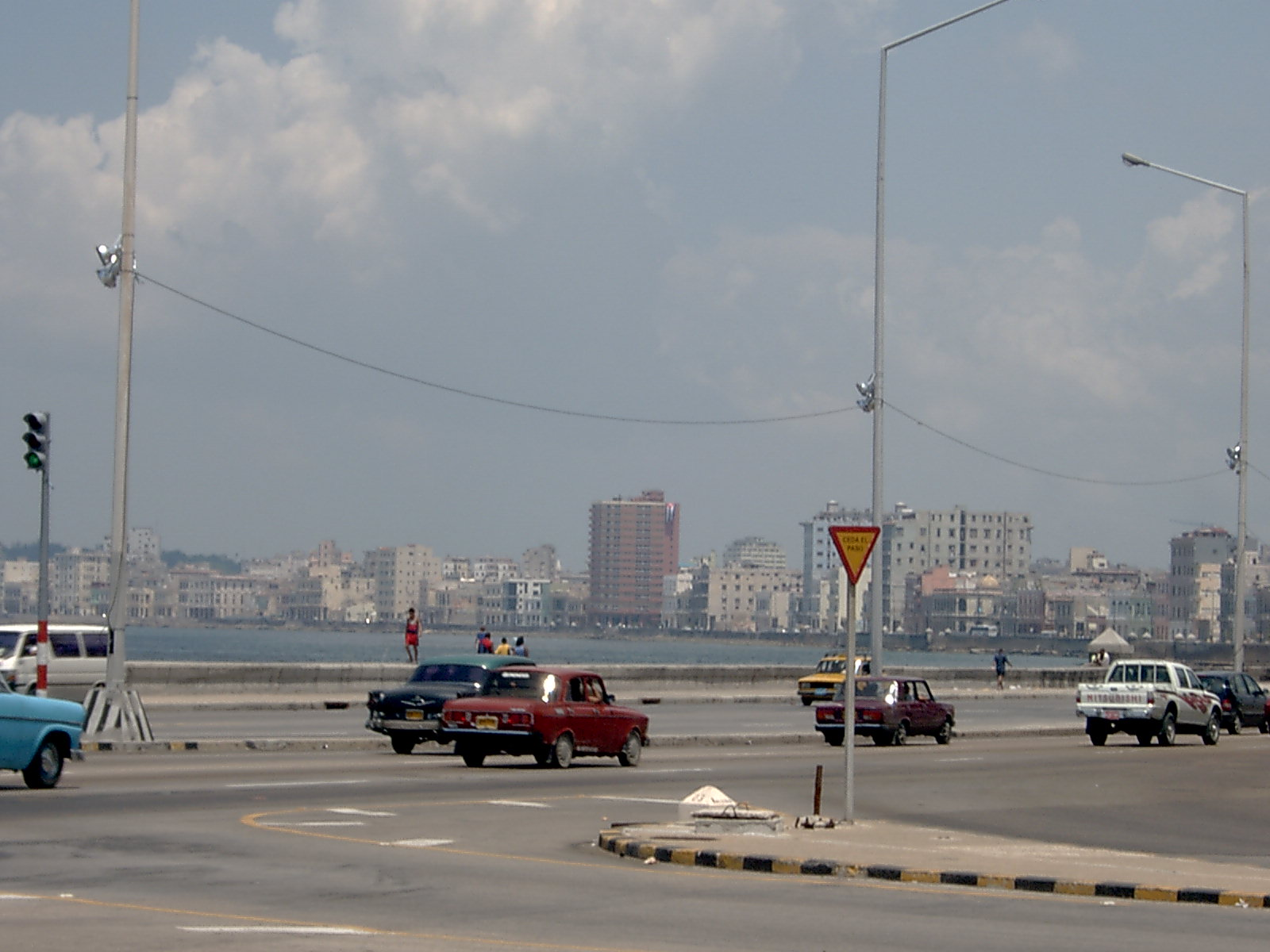 Il Malecón, un'arteria cittadina lungomare, La Habana, Cuba